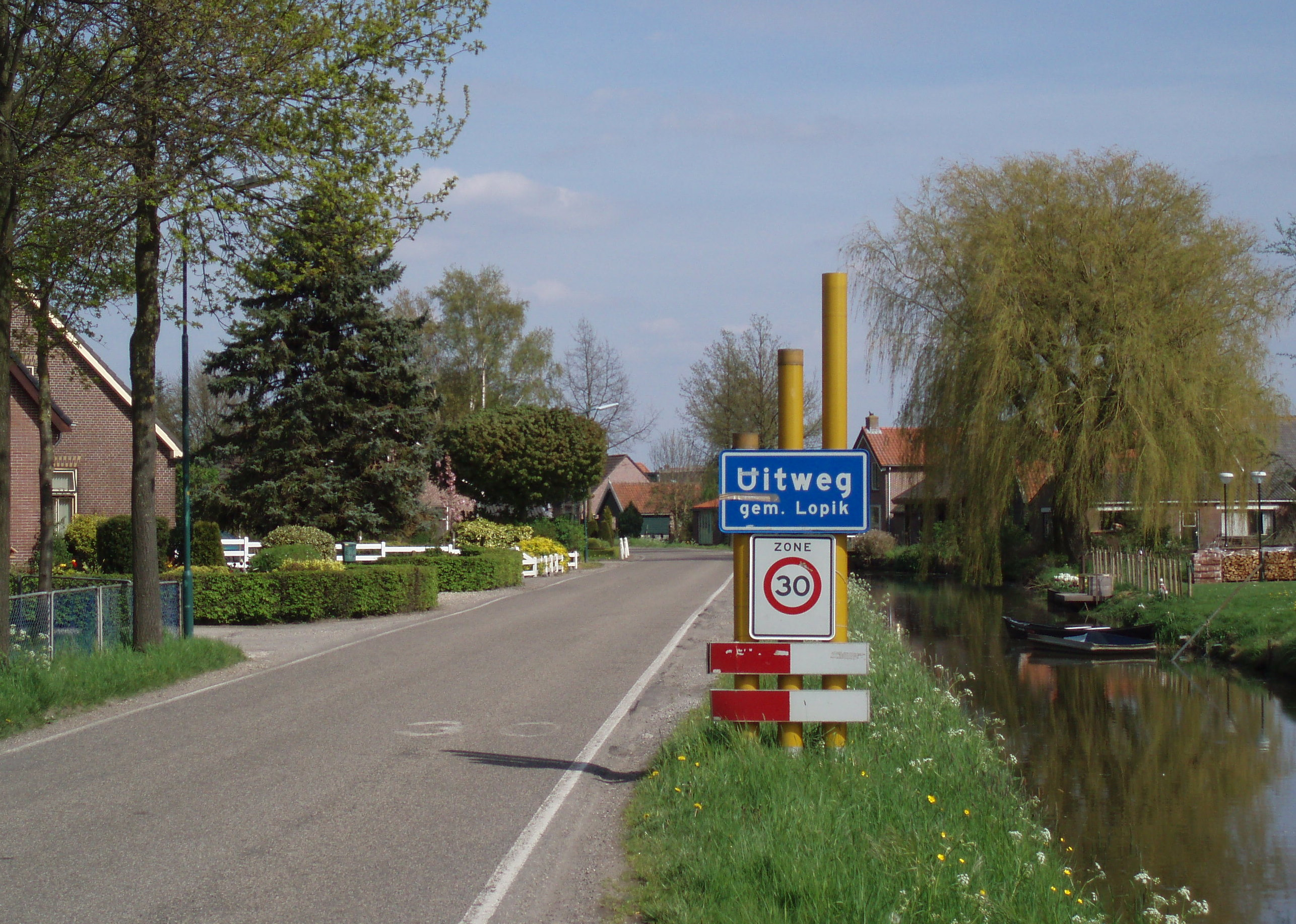 Plaatsnaambord van Uitweg.